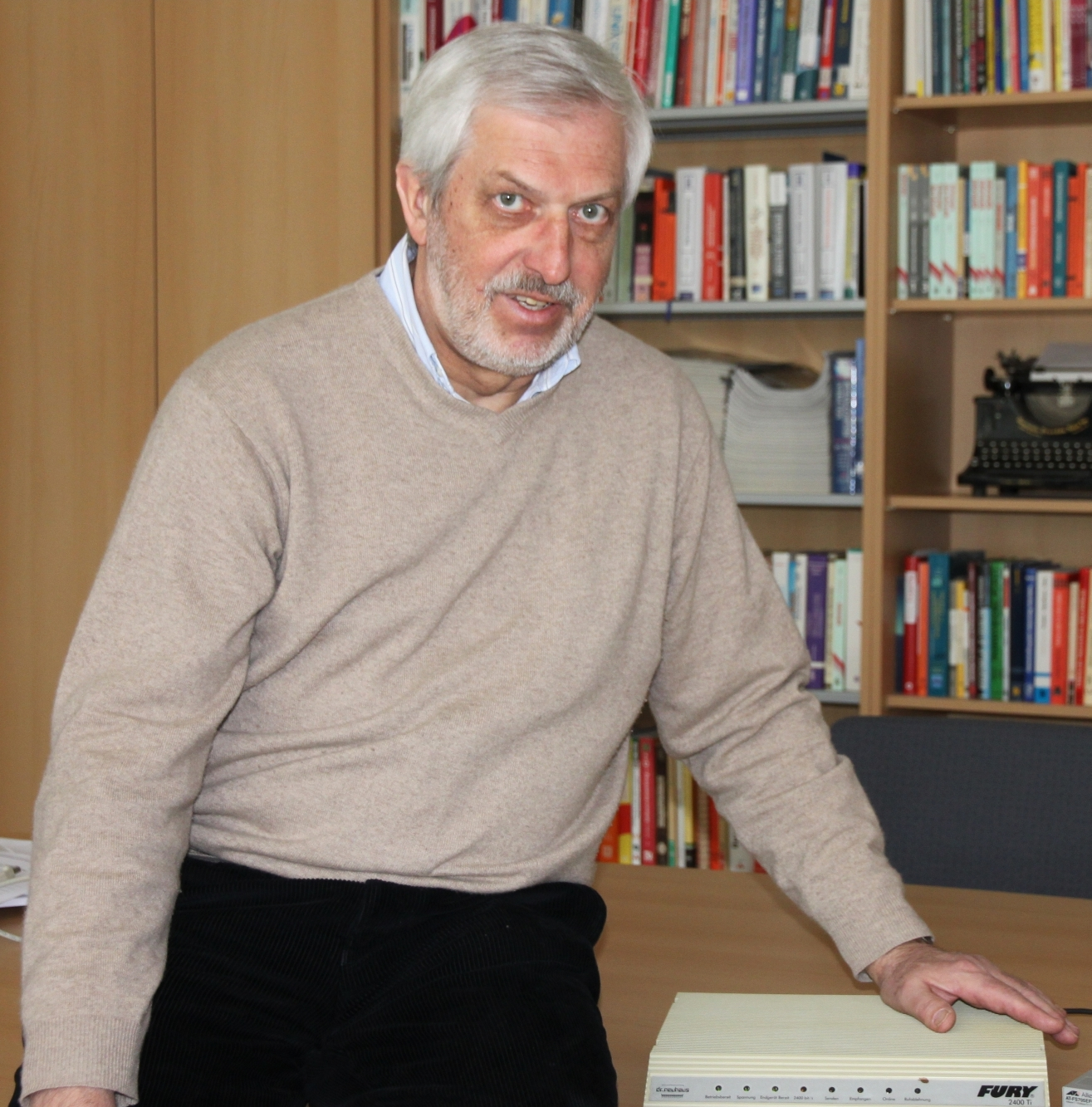 Prof. Dr. Lutz Wegner